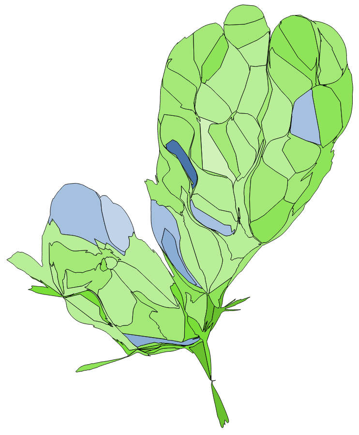 顏色對照表